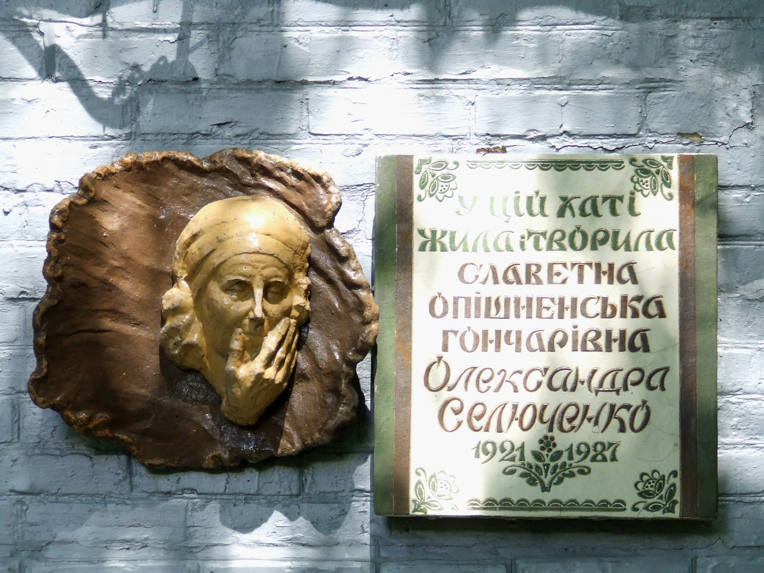 Меморіальна садиба - музей О.Ф.Селюченко., Опішня, вул. Губаря, 29